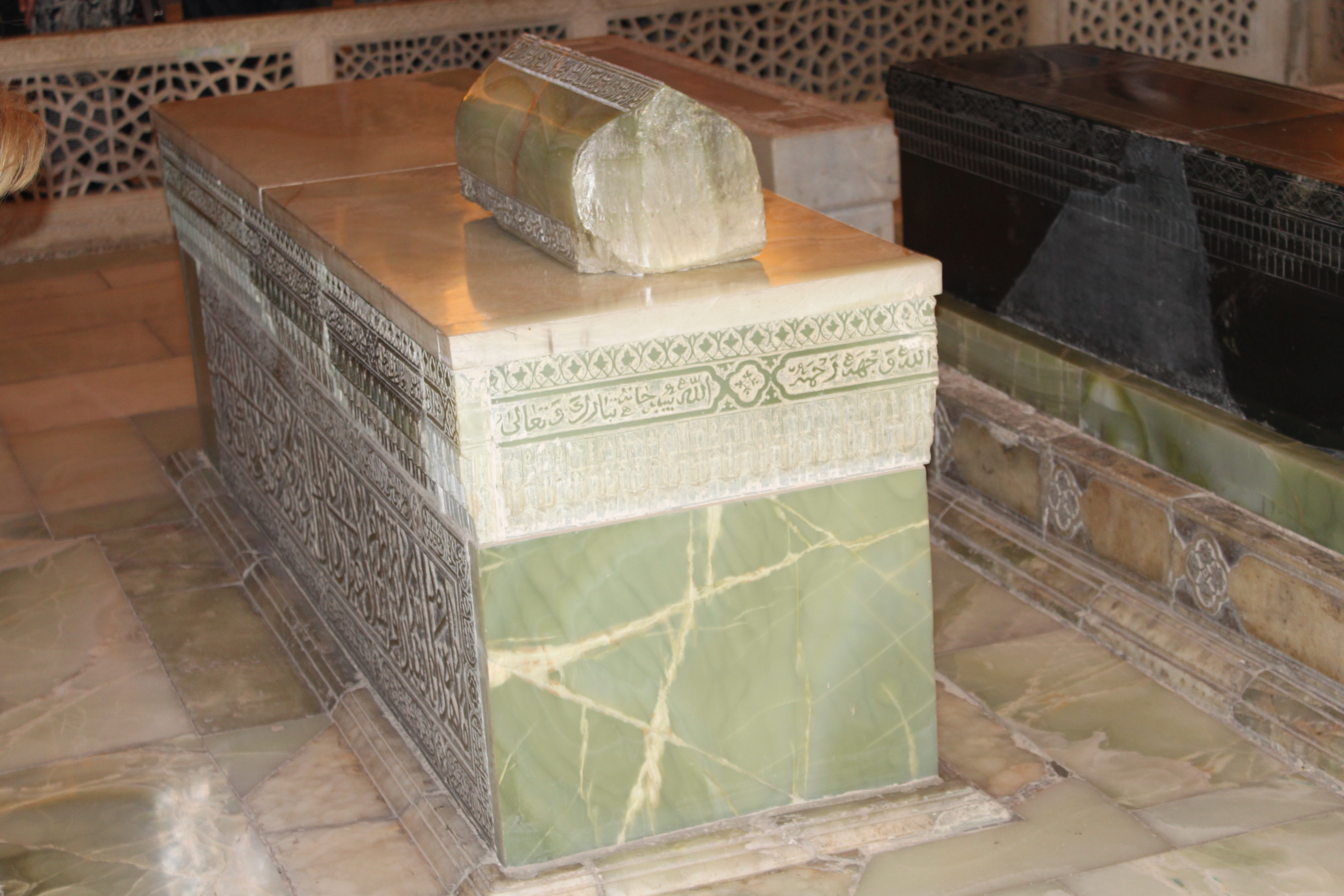 Tombeaux de Gour Emir